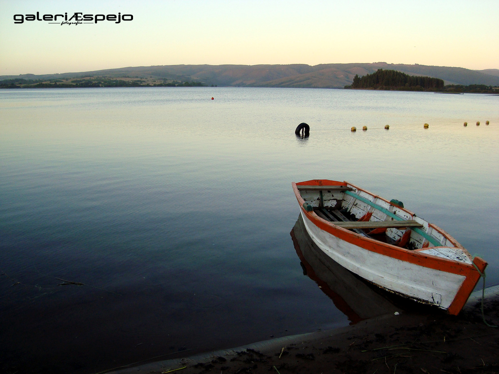 Atardecer en el lago, Camping N°2 Araucaria.